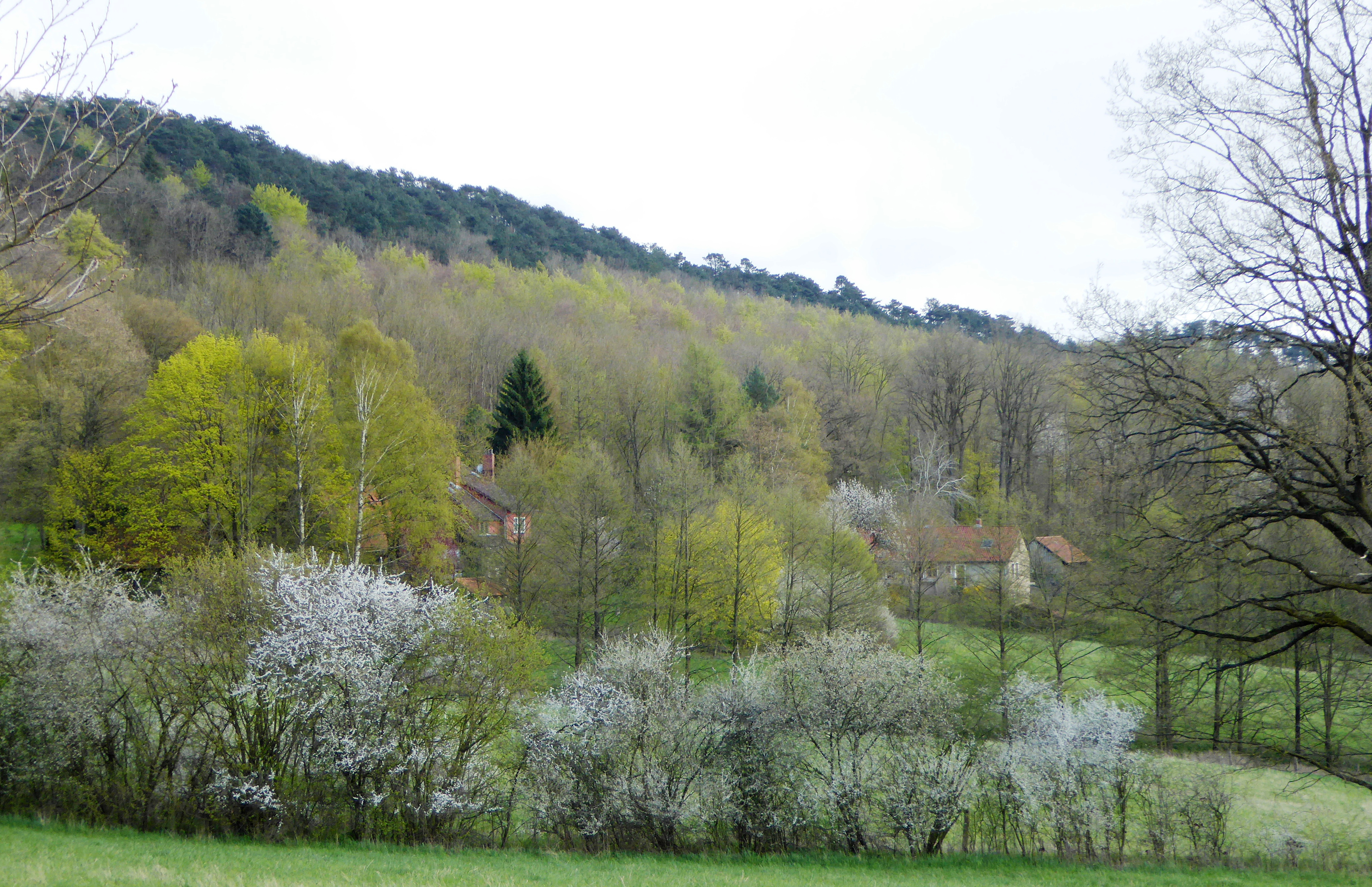 Siedlung Leisenrode am Hang der Weper nördlich der Stadt Hardegsen, Südniedersachsen. Blick von Nordnordwesten